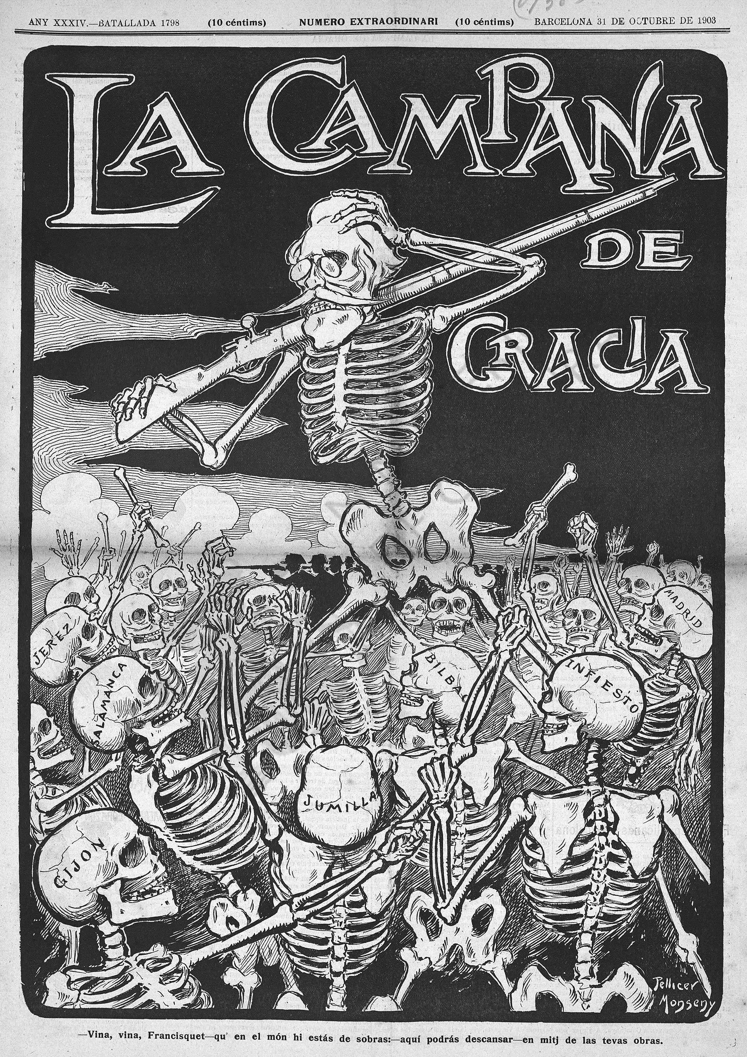 Portada.